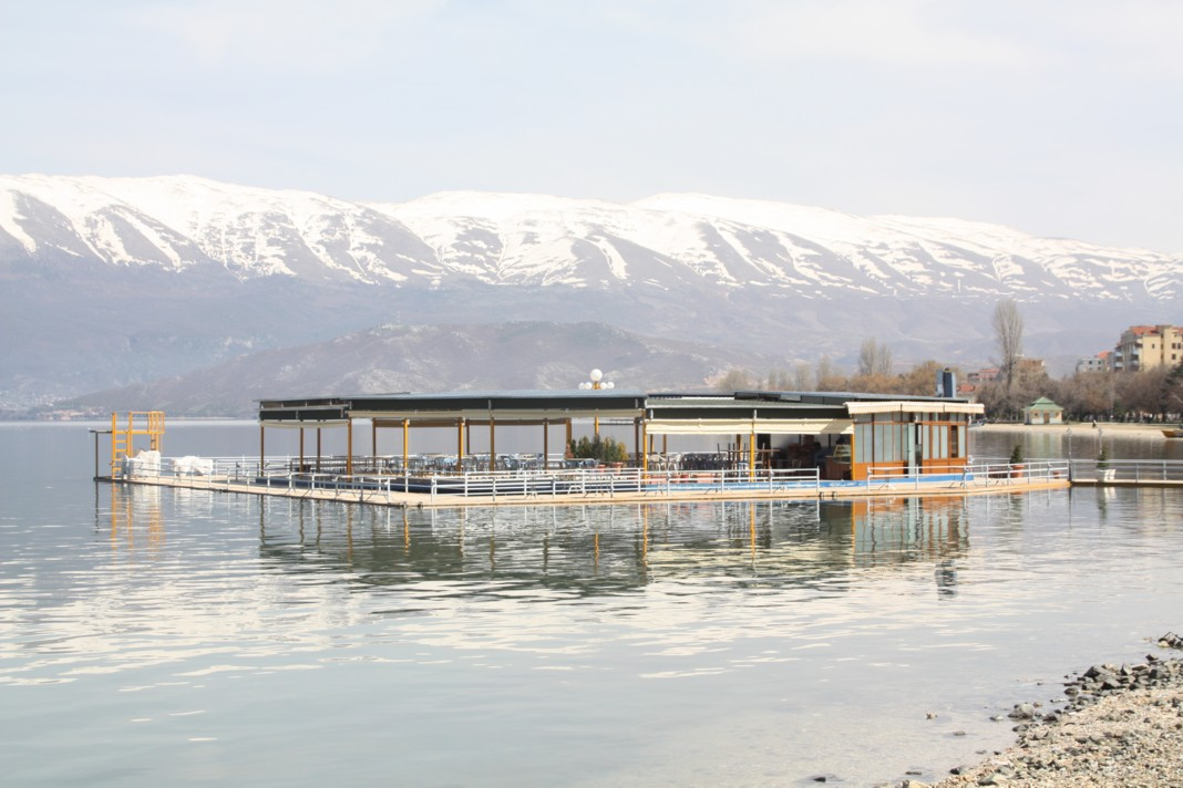 Pogradec פוגרדץ